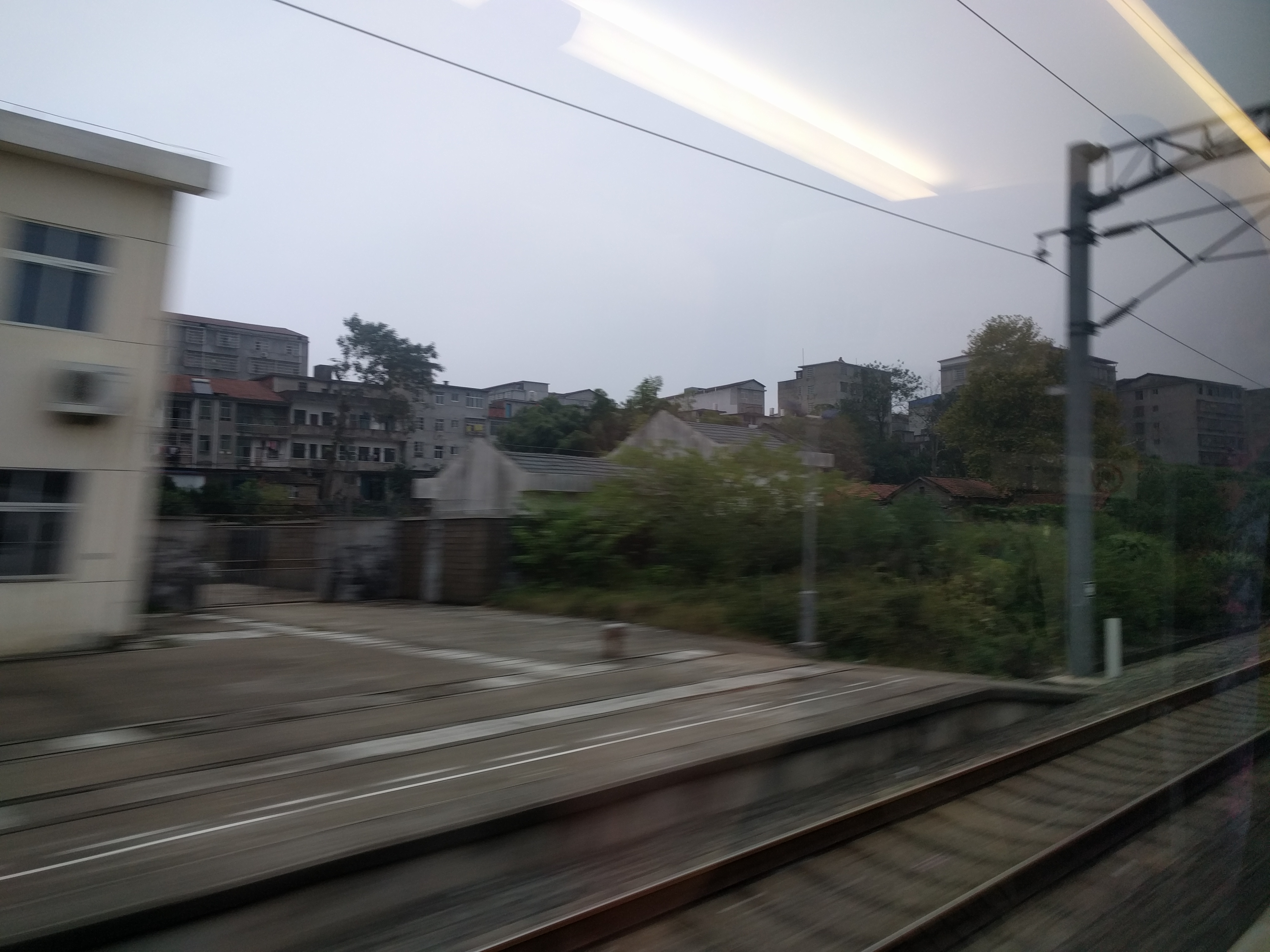 大岗站站房